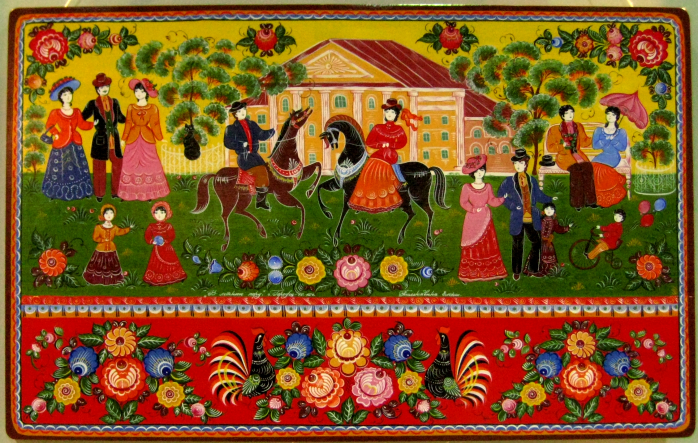 ЗАО "Городецкая роспись", выставка "Ладья-2010"